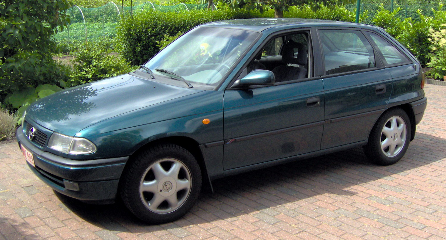 1997 Opel Astra TD